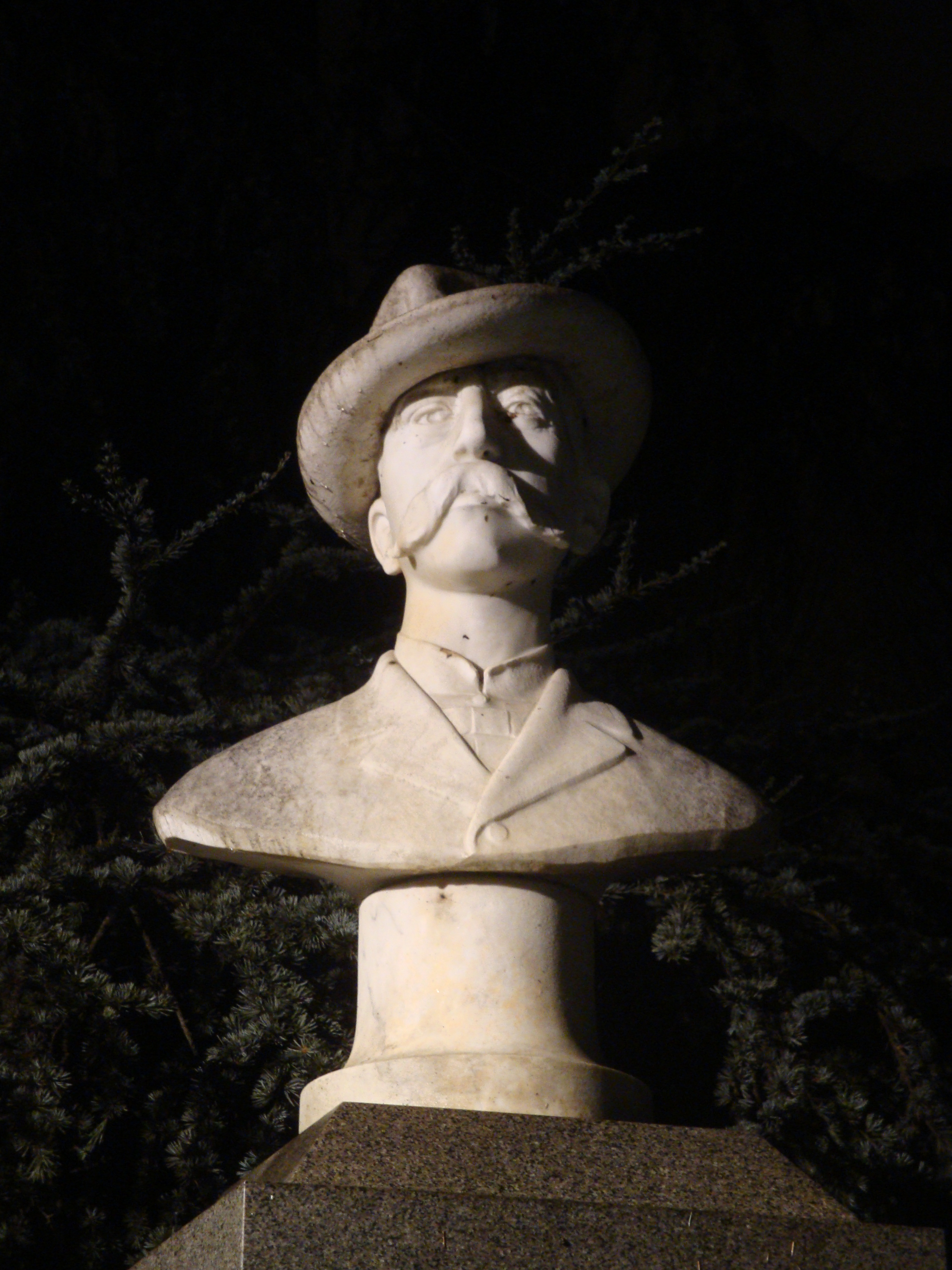 Felice Cavallotti, busto di marmo ad Alessandria, Italia